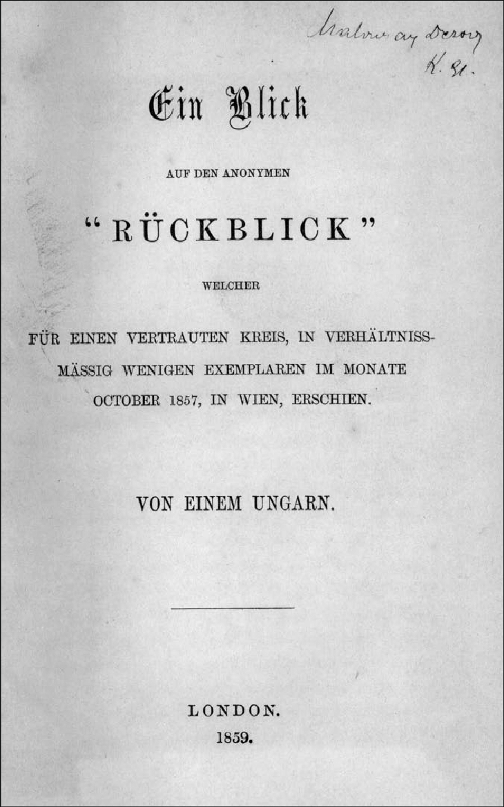 Széchenyi "Ein Blick"című munkájának címlapja